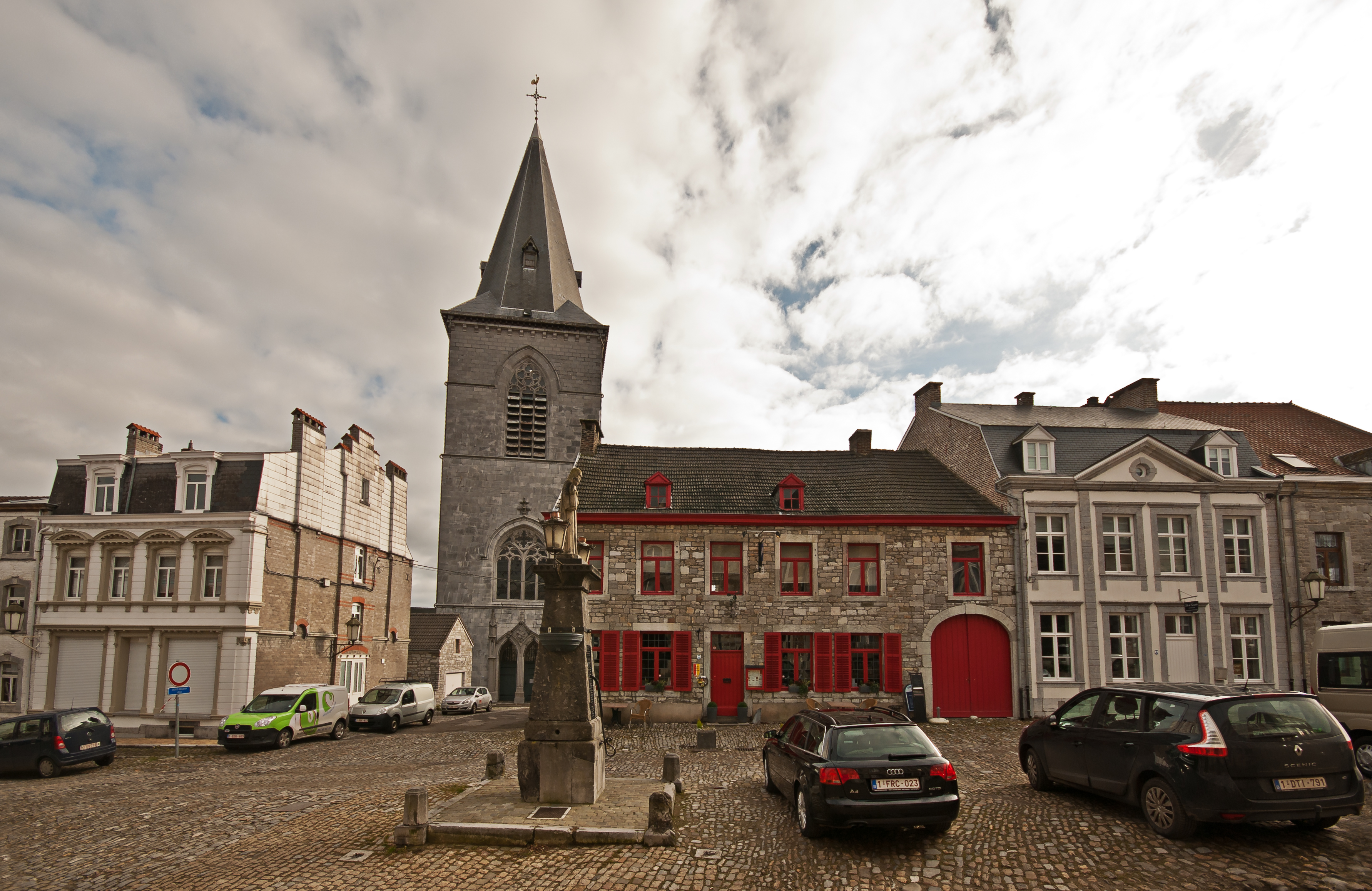 Blick über die Place St. Georges